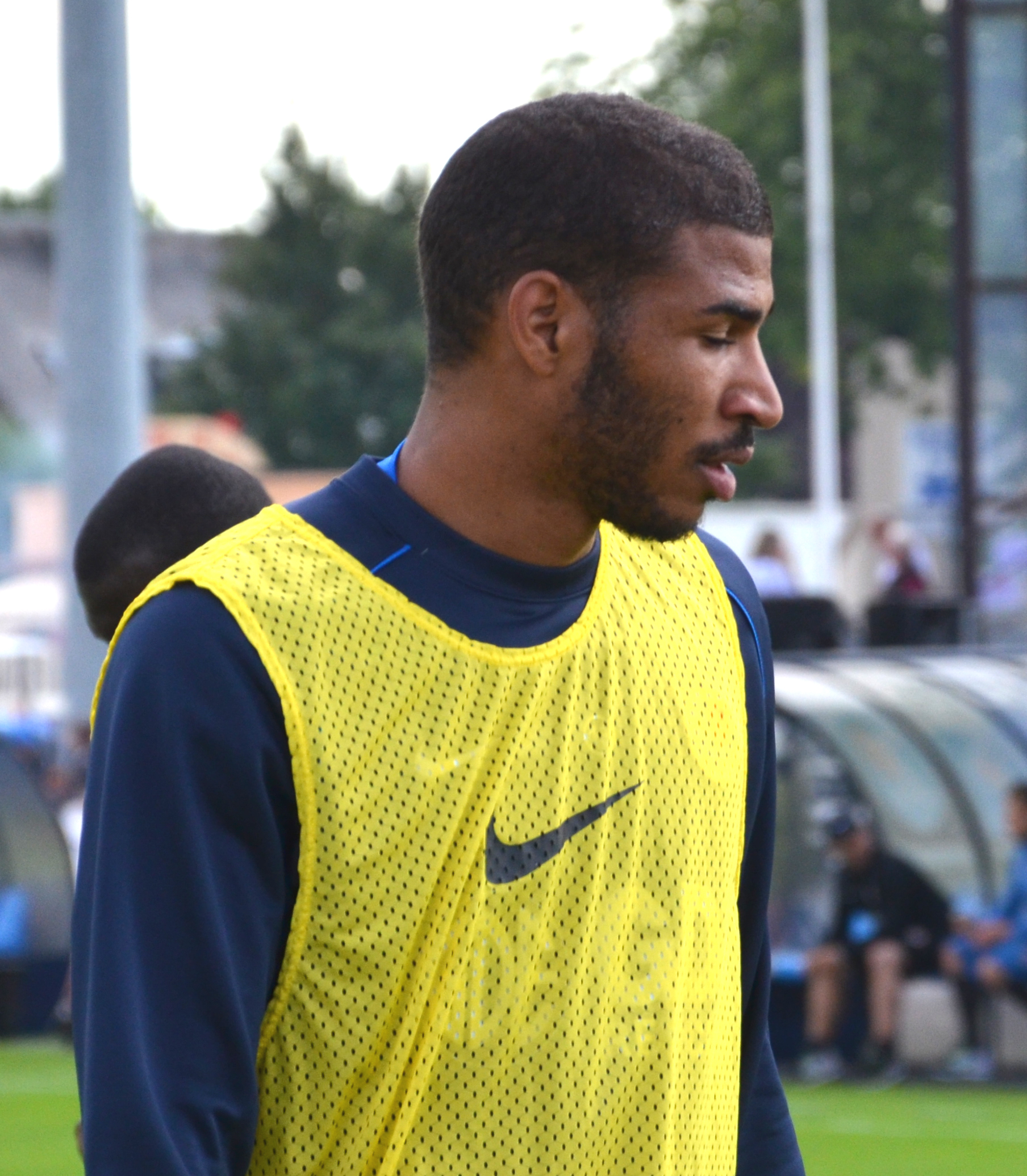 Photographie prise à l'occasion de la rencontre amicale opposant le Stade Malherbe de Caen au Stade rennais, le 9 juillet 2014 au stade Pierre-Comte de Vire. Ici, Jordan Adéoti.